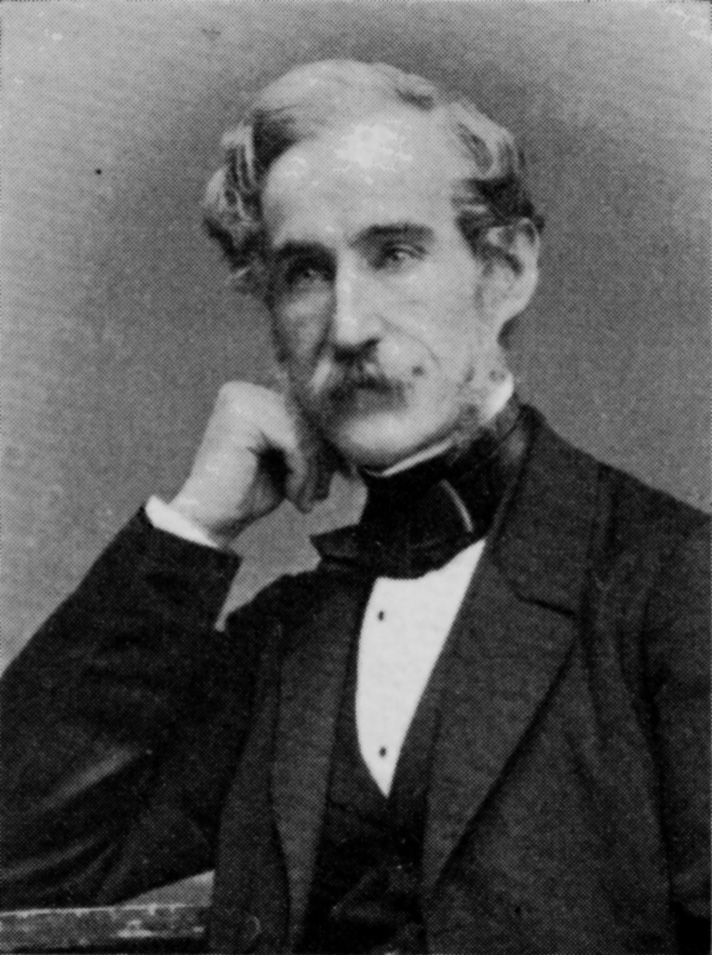 Henning Hamilton